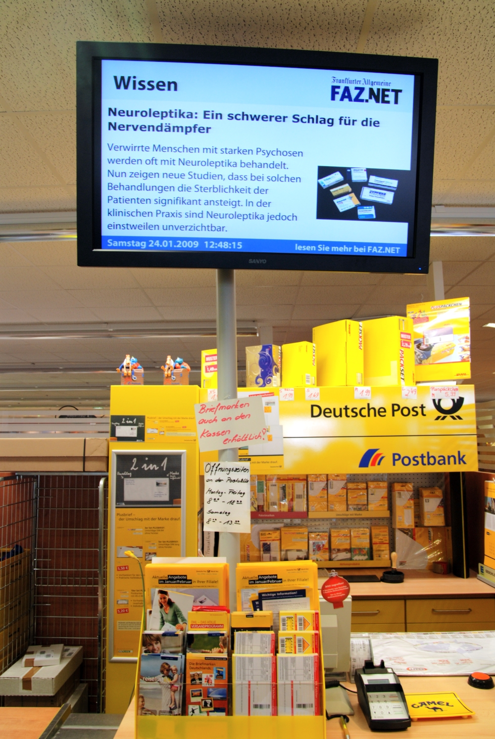 Digital Signage in der Postfiliale eines Rügener Edeka-Marktes